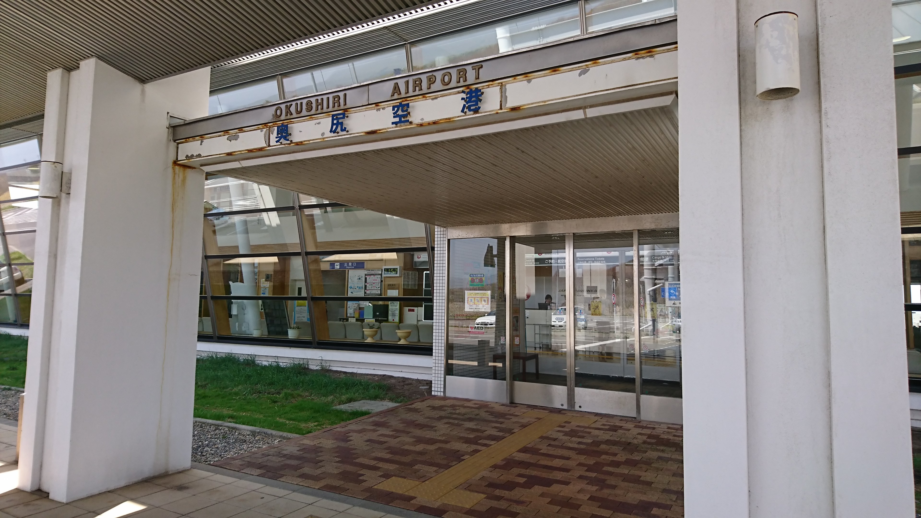 奥尻空港ターミナル出入口